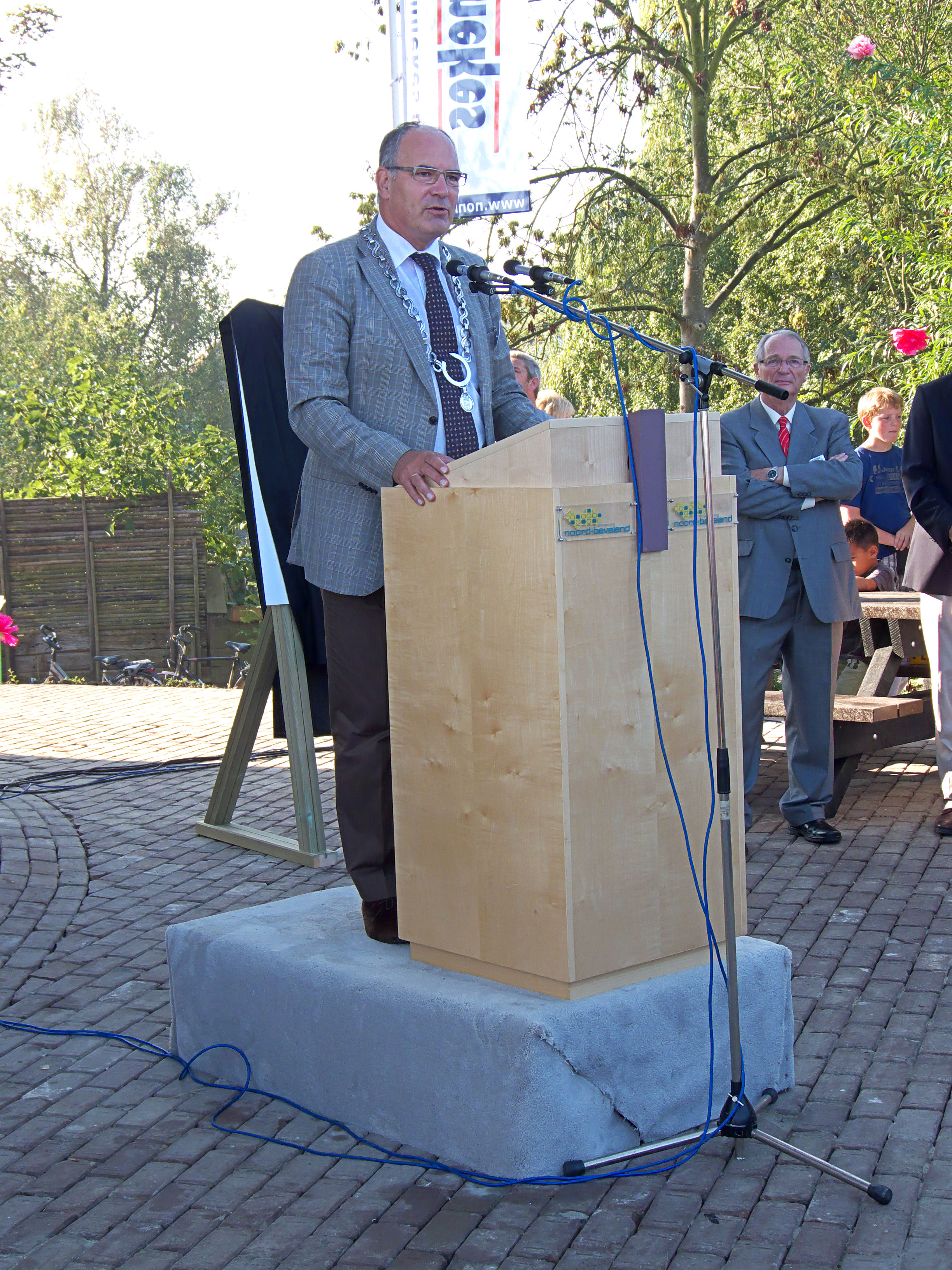 Molen De Korenbloem, Kortgene, toespraak voor de onthulling van het sponsorbord door Henny van Kooten, de burgemeester van Noord-Beveland. Op de achtergrond de voorzitter van de Stichting Molen de Korenbloem, Hans Jager Bruining